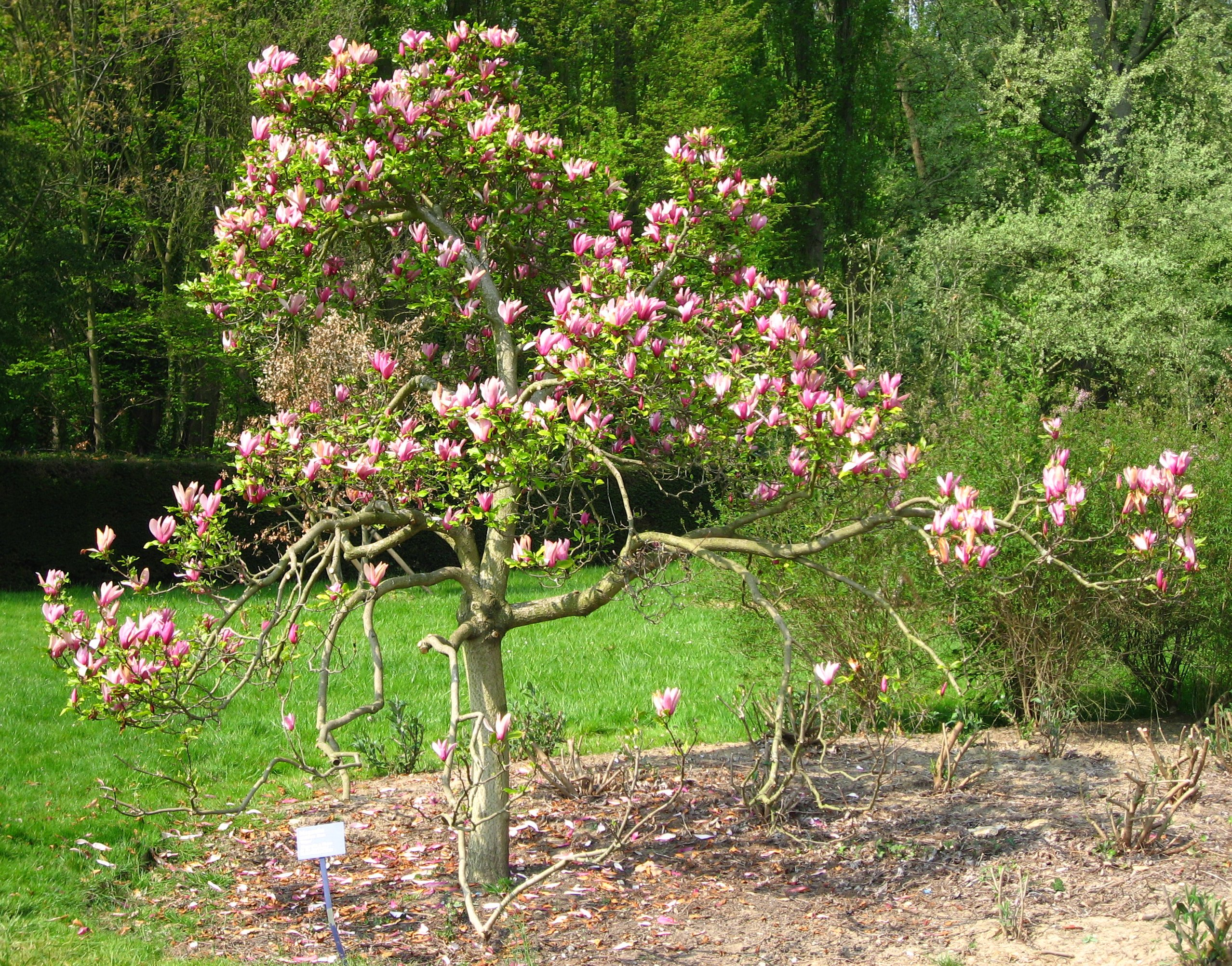 Magnolia liliiflora Desr. 'Nigra' (Magnolia à fleur de lis (cultivar)) in Arboretum de la Vallée-aux-Loups